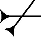 Cuneiform sign